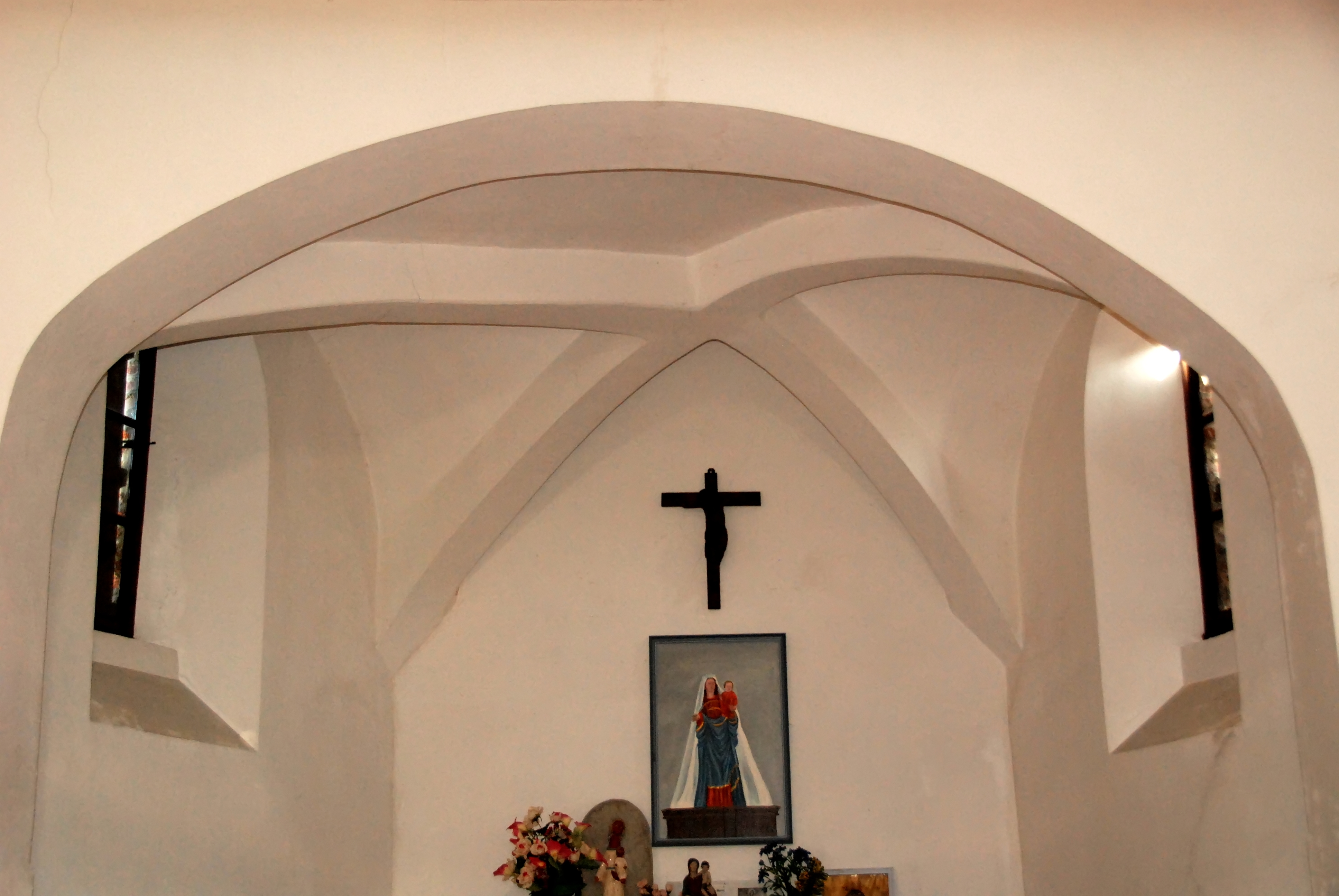 Belgique - Wallonie - Bousval - Chapelle du Try-au-Chêne